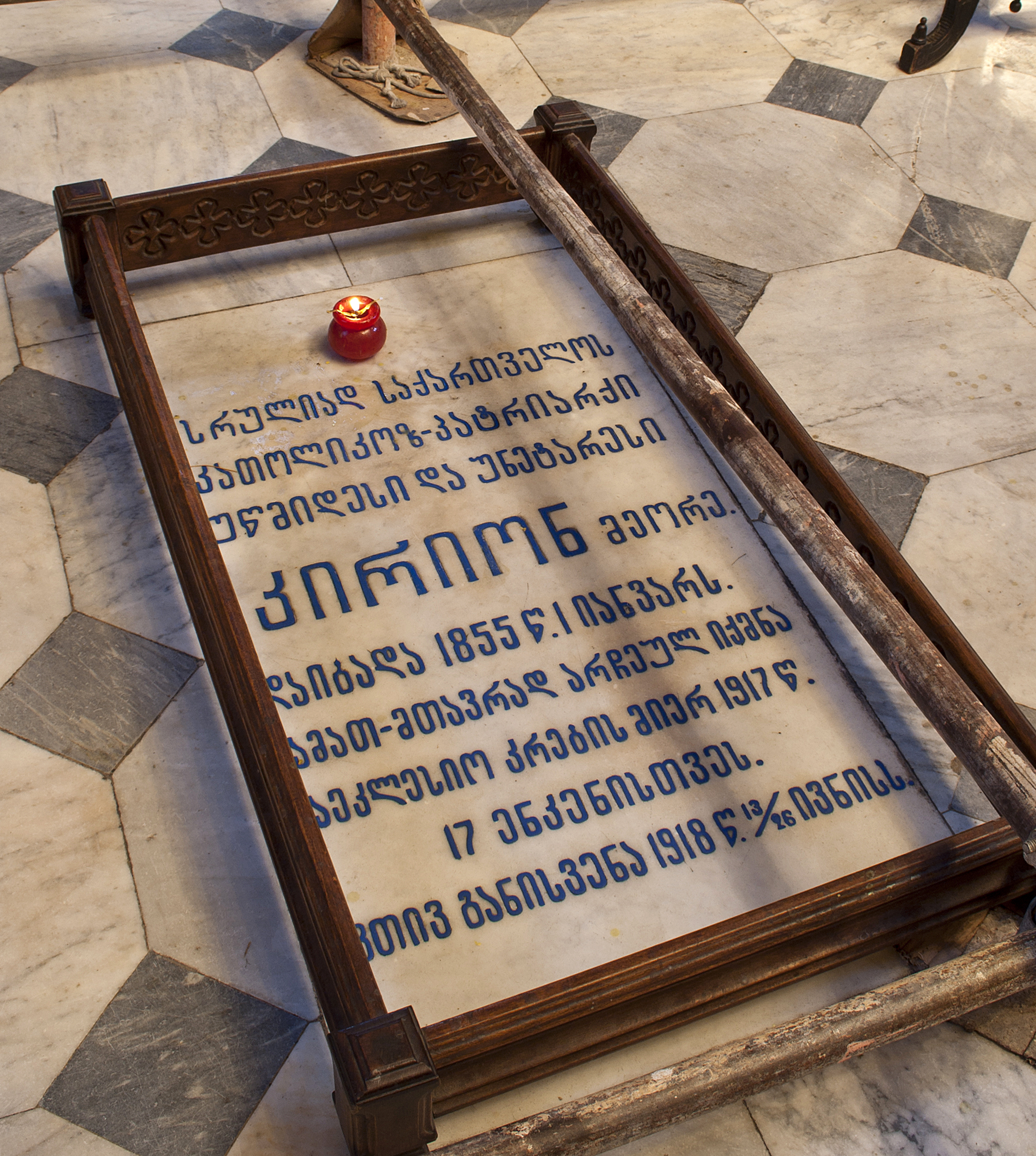 Надгробье Кириона Второго в Сионском Храме. Тбилиси